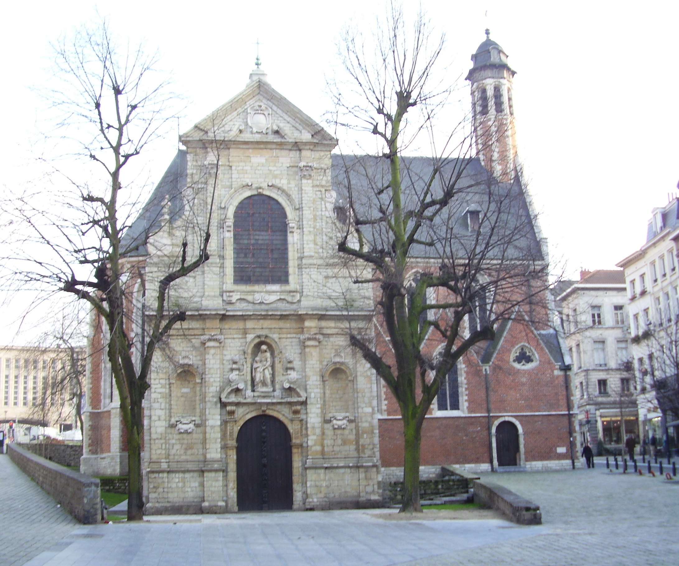 Chapelle de la Madeleine,XVe siècle, Bruxelles - Belgique